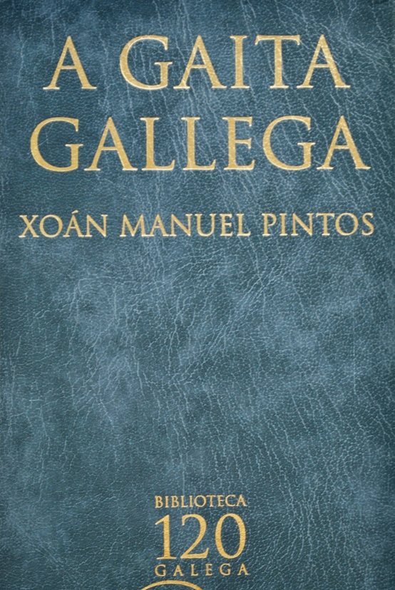 Detalle da portada dun volume de A gaita gallega de Xoán Manuel Pintos, número 3 da Biblioteca Galega 120.